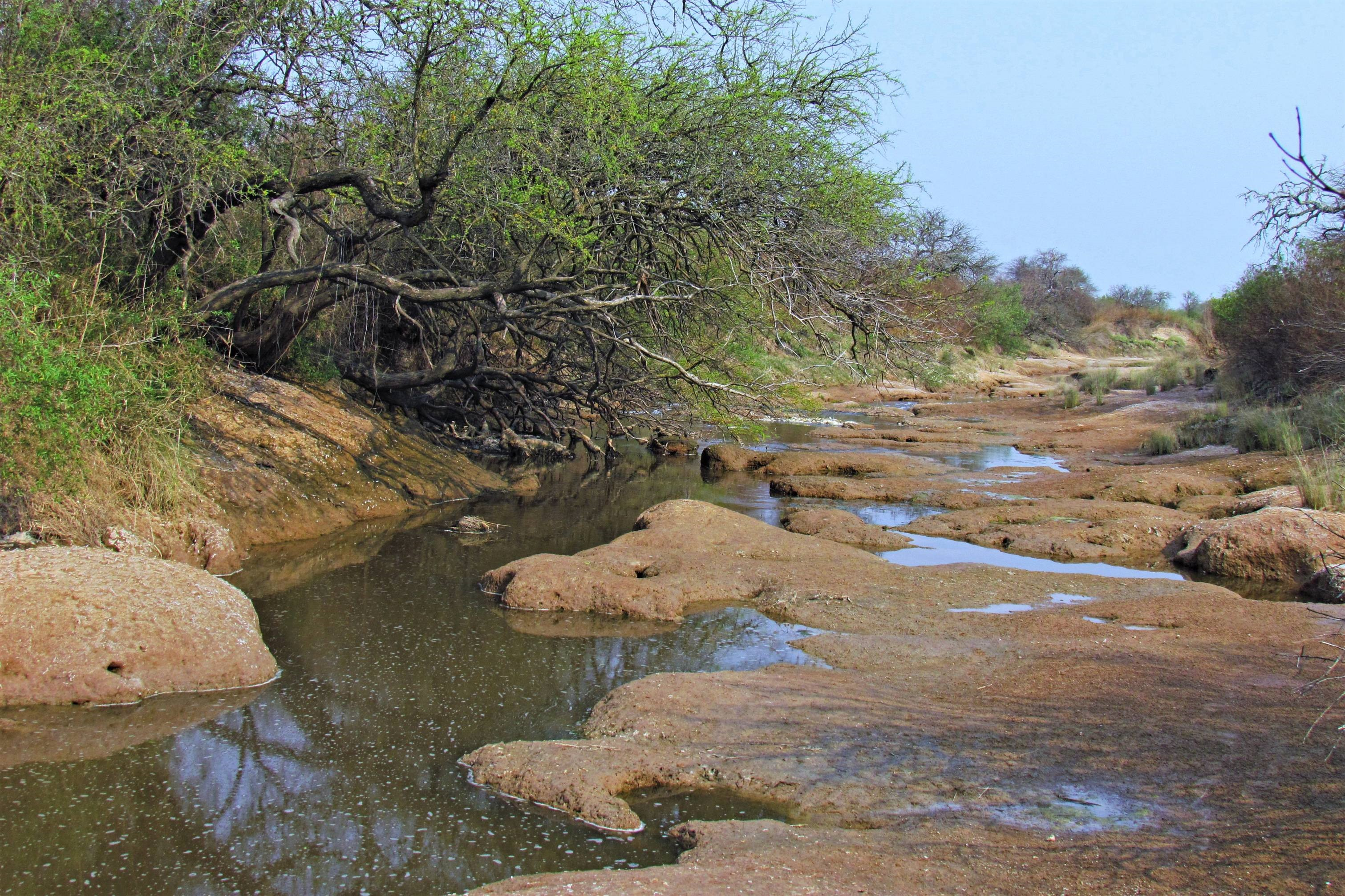 Descripción paisajística de la zona rural de Progreso (Santa Fe)